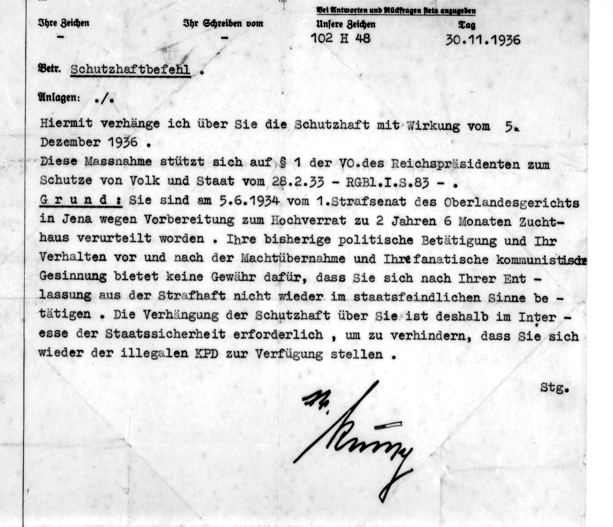 Schutzhaftbefehl der GeStaPo und Einweisung ins KZ